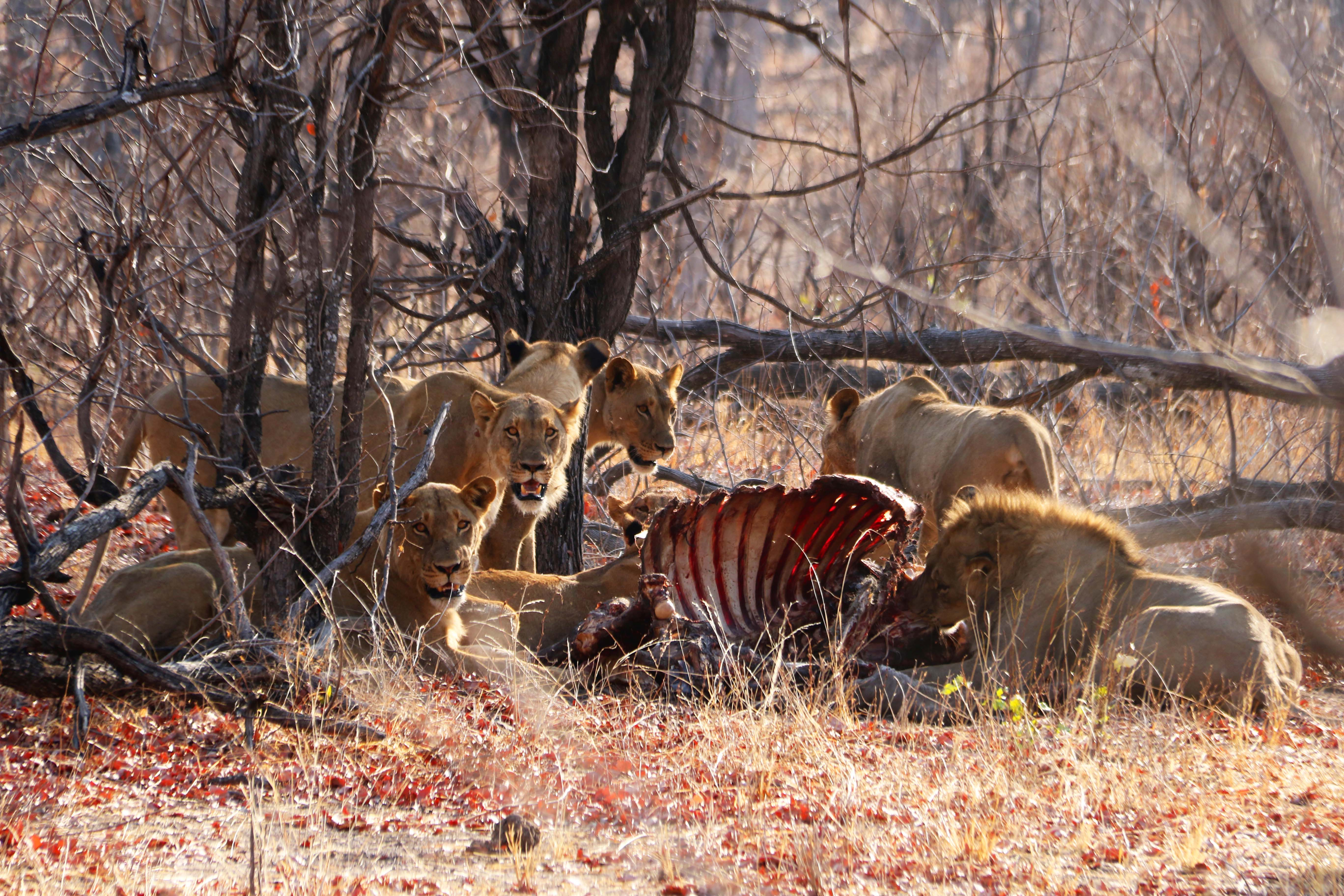 dejeuner des lions au zimbabwe